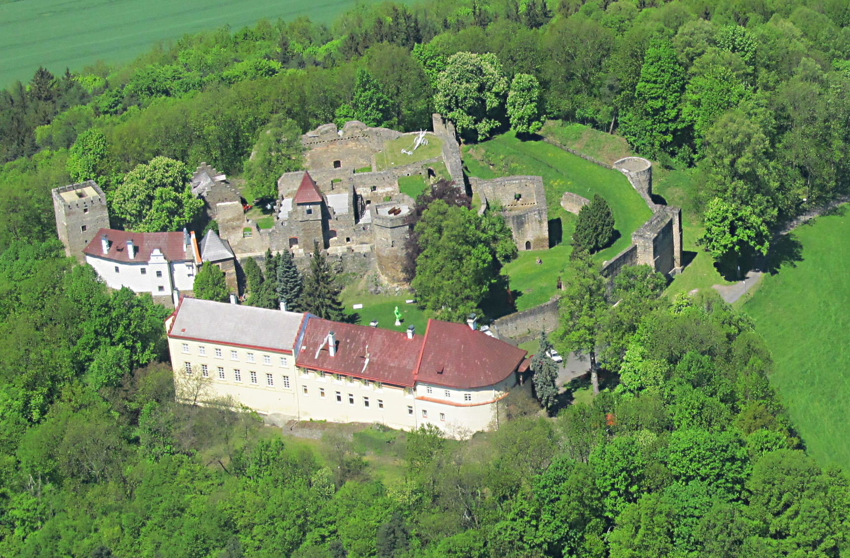 Hrad Klenová z nebe